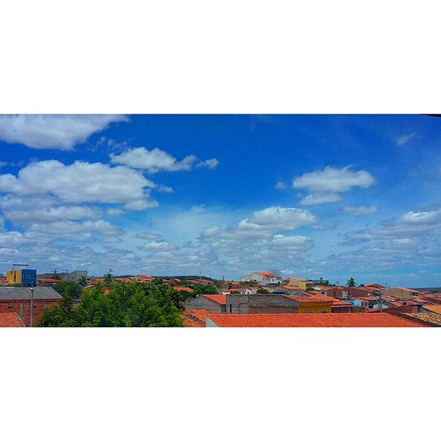 Centro de Santa Brígida